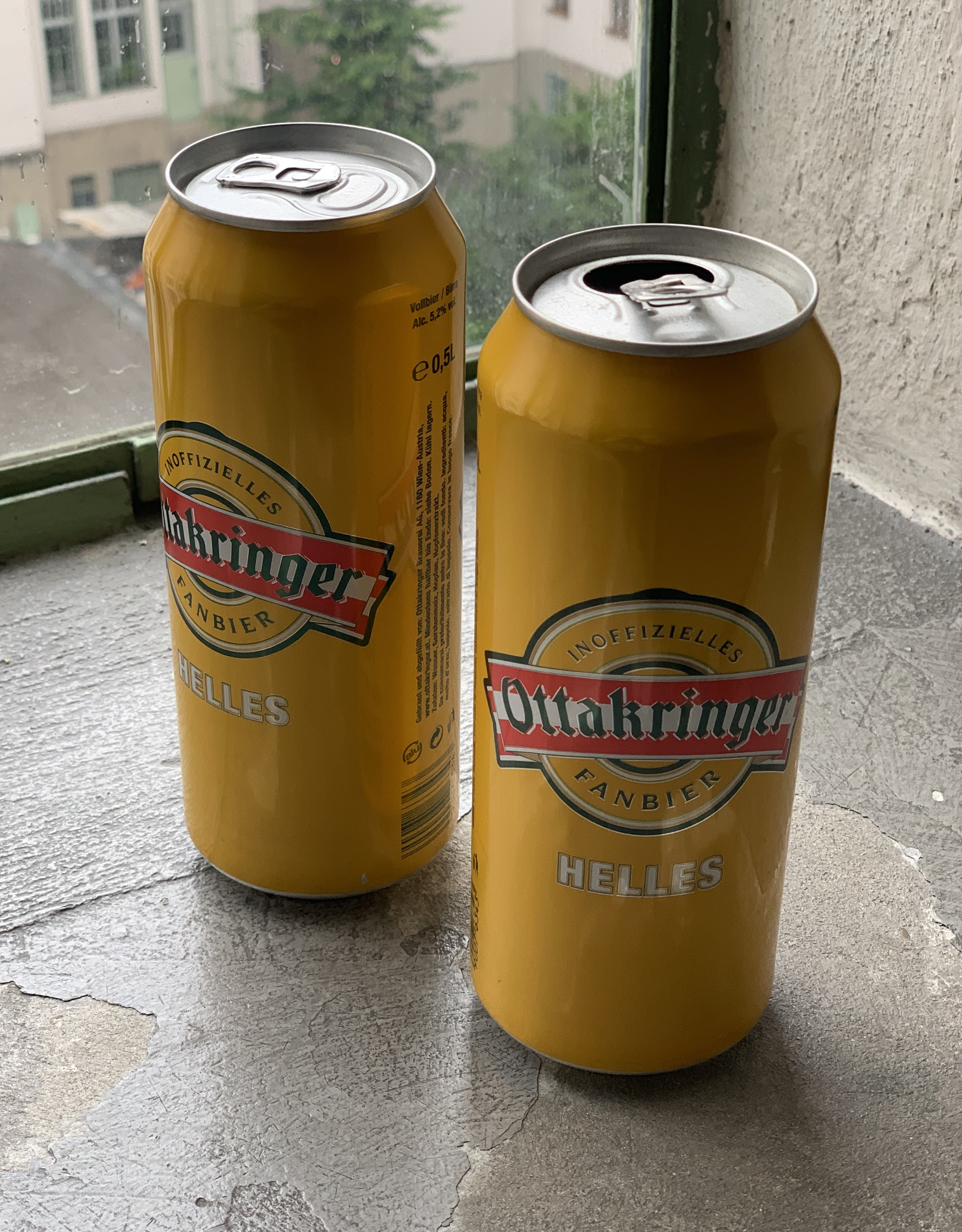 Inoffizielles Fanbier der Ottakringer Brauerei zur Fußball EM 2008 - im Mai 2008 wurde in Wien zur Fußball-EM 2008 das inoffizielle Fan-Bier für die Ottakringer Brauerei kreiert, welches als Protest-Bier verstanden wurde, da die EM zwar unter anderem in Österreich veranstaltet wurde, aber der dänische Carlsberg-Konzern als Sponsor der UEFA die exklusiven Ausschankrechte in den Fanzonen inne hatte und dort kein österreichisches Bier ausgeschenkt werden durfte